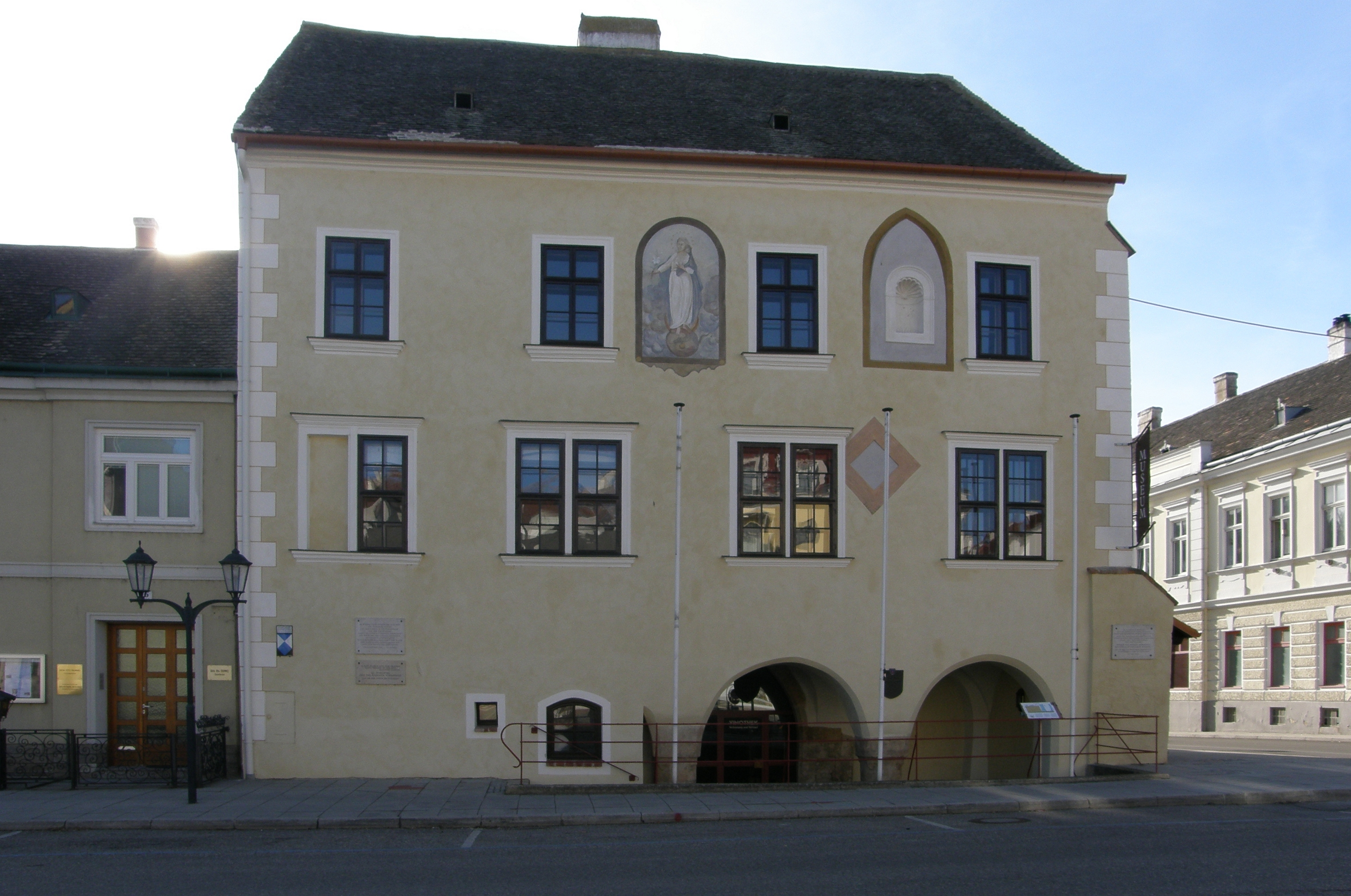 Heimatmuseum, Altes Rathaus